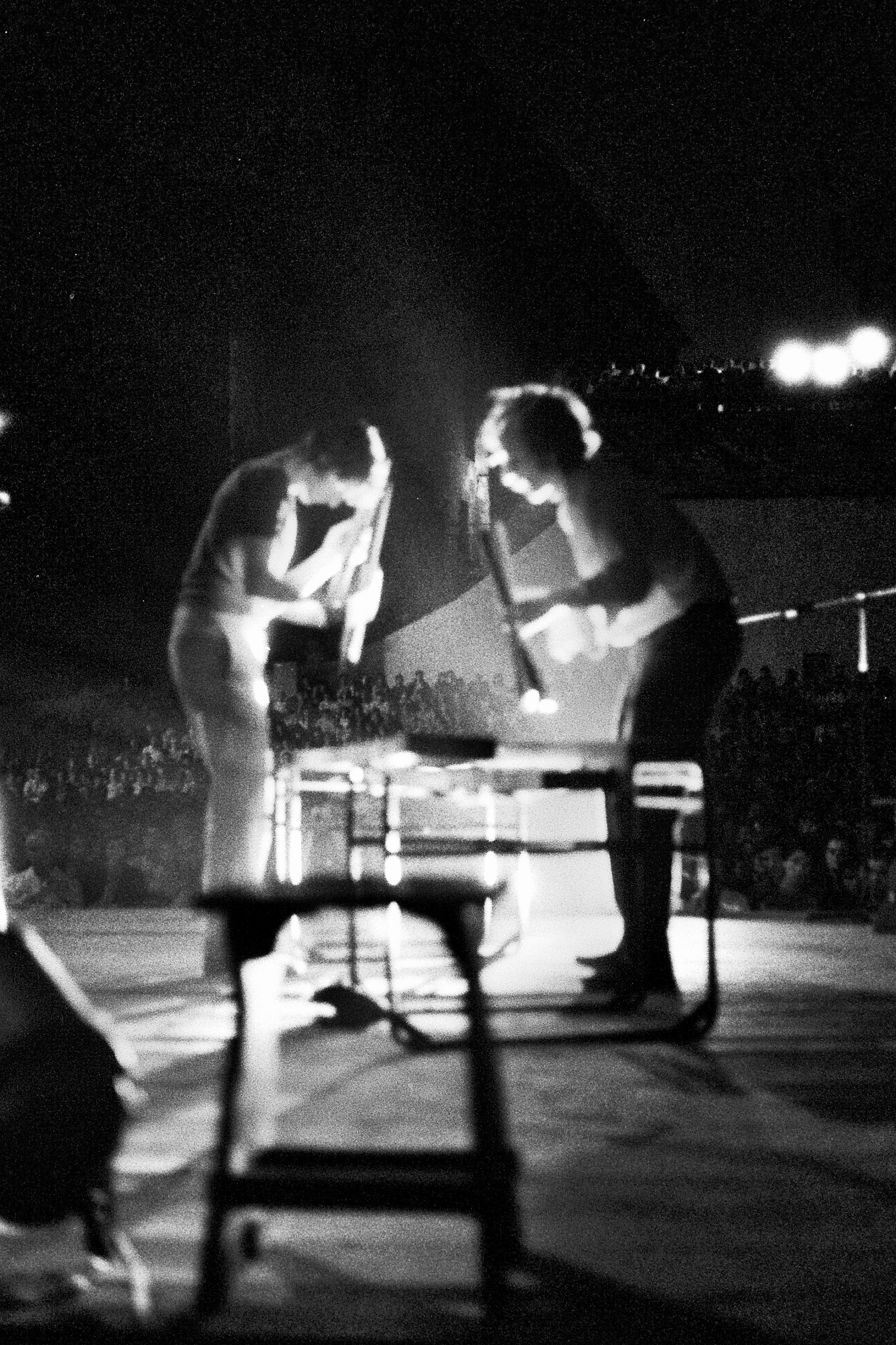 Artze anaien kontzertua, Ez Dok Amairuren festibal batean.